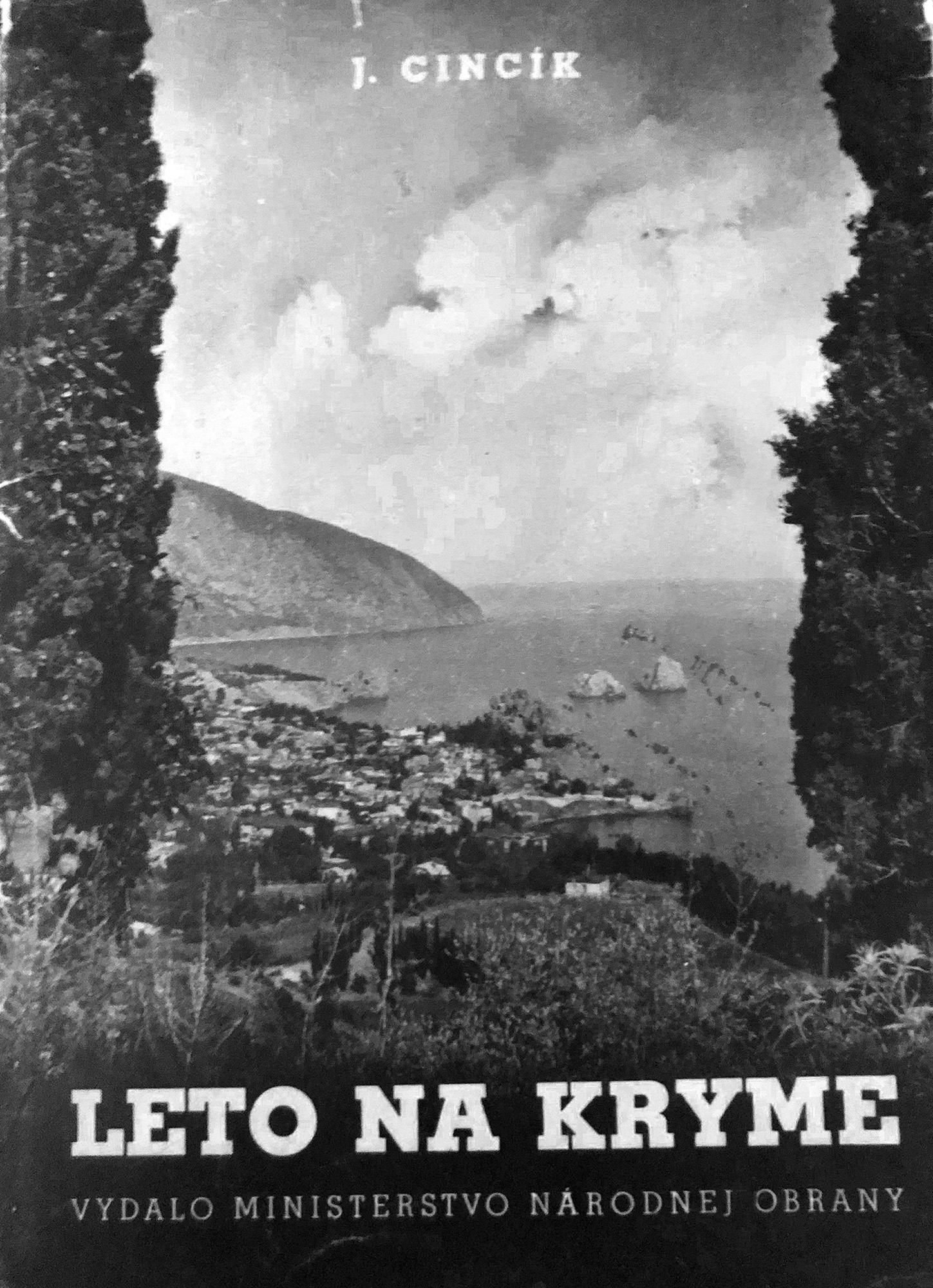 Leto na Kryme - Jozef Cincík a Jozef Janík, 1944, Ministerstvo národnej obrany